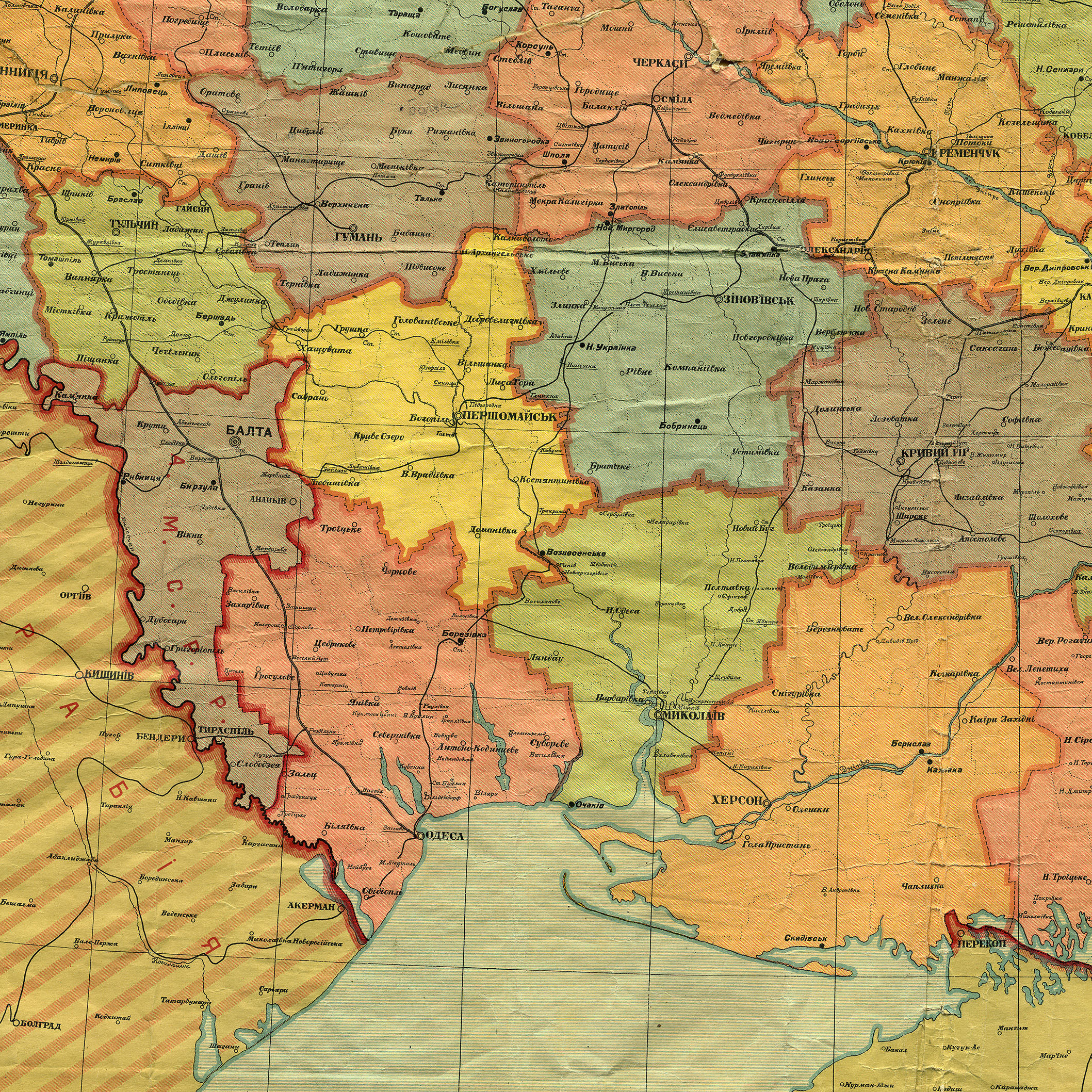 Територія колишньої Одеської губернії, фрагмент мапи Української соц. рад. республіки, адміністративний поділ від 1 жовтня 1925